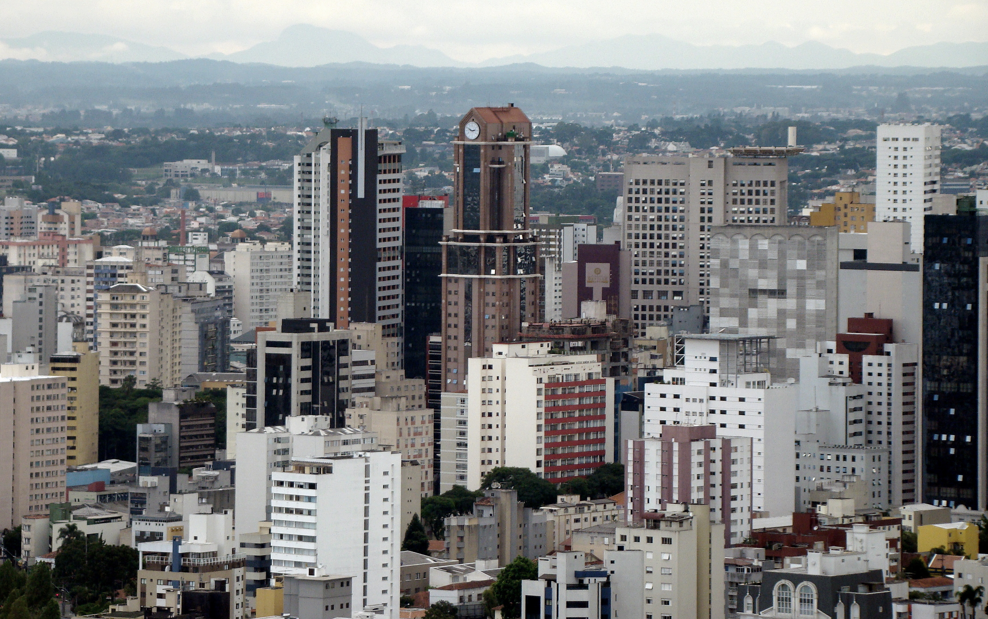 Skyline de Curitiba (Paraná, Sul do Brasil) com o Edifício Curitiba Trade Center ao centro da imagem e com a Serra do Mar ao fundo.